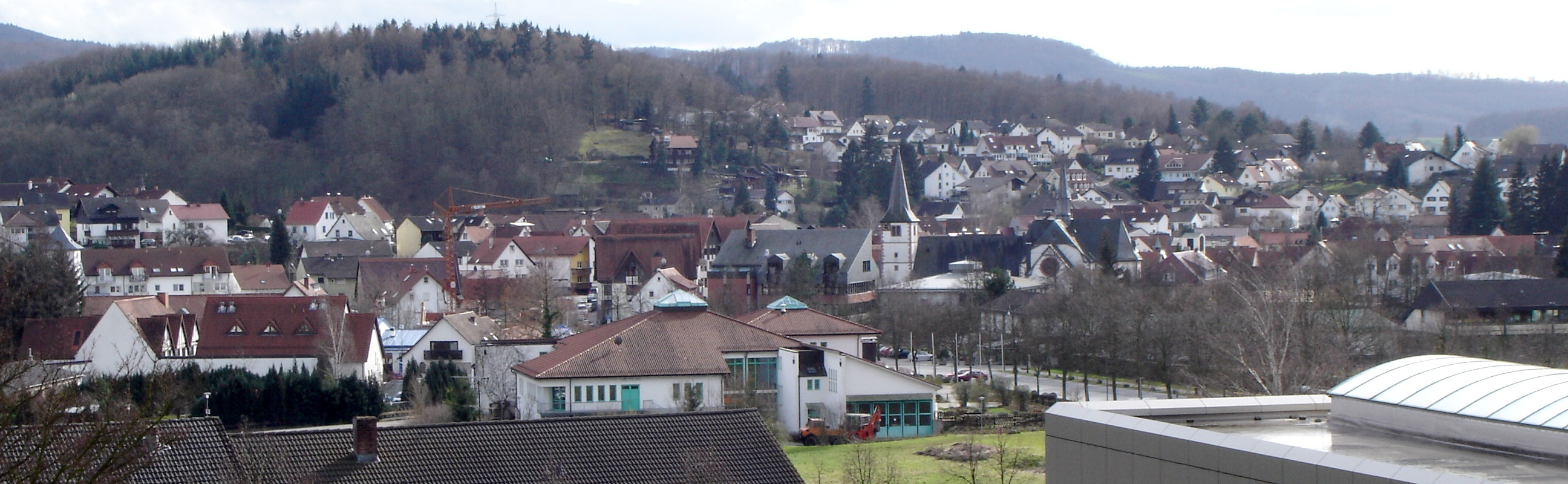 Panorama von Mörlenbach/Deutschland